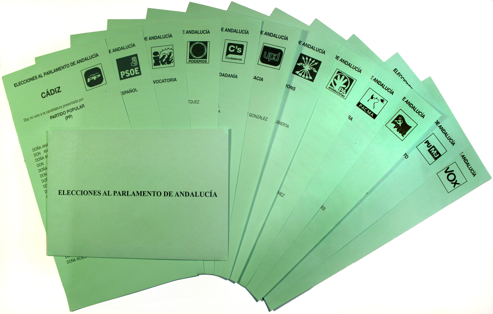 Papeletas electorales y sobre de votación para las Elecciones al Parlamento de Andalucía de 2015 por la circunscripción de Cádiz provenientes del voto por correo. Se muestran las papeletas de las candidaturas del Partido Popular Andaluz, Partido Socialista Obrero Español de Andalucía, Izquierda Unida Los Verdes-Convocatoria por Andalucía, Podemos, Ciudadanos-Partido de la Ciudadanía, Unión Progreso y Democracia, Falange Española de las JONS, Partido Andalucista, Partido Animalista Contra el Maltrato Animal, Partido Comunista de los Pueblos de España, Por un Mundo Más Justo y VOX.